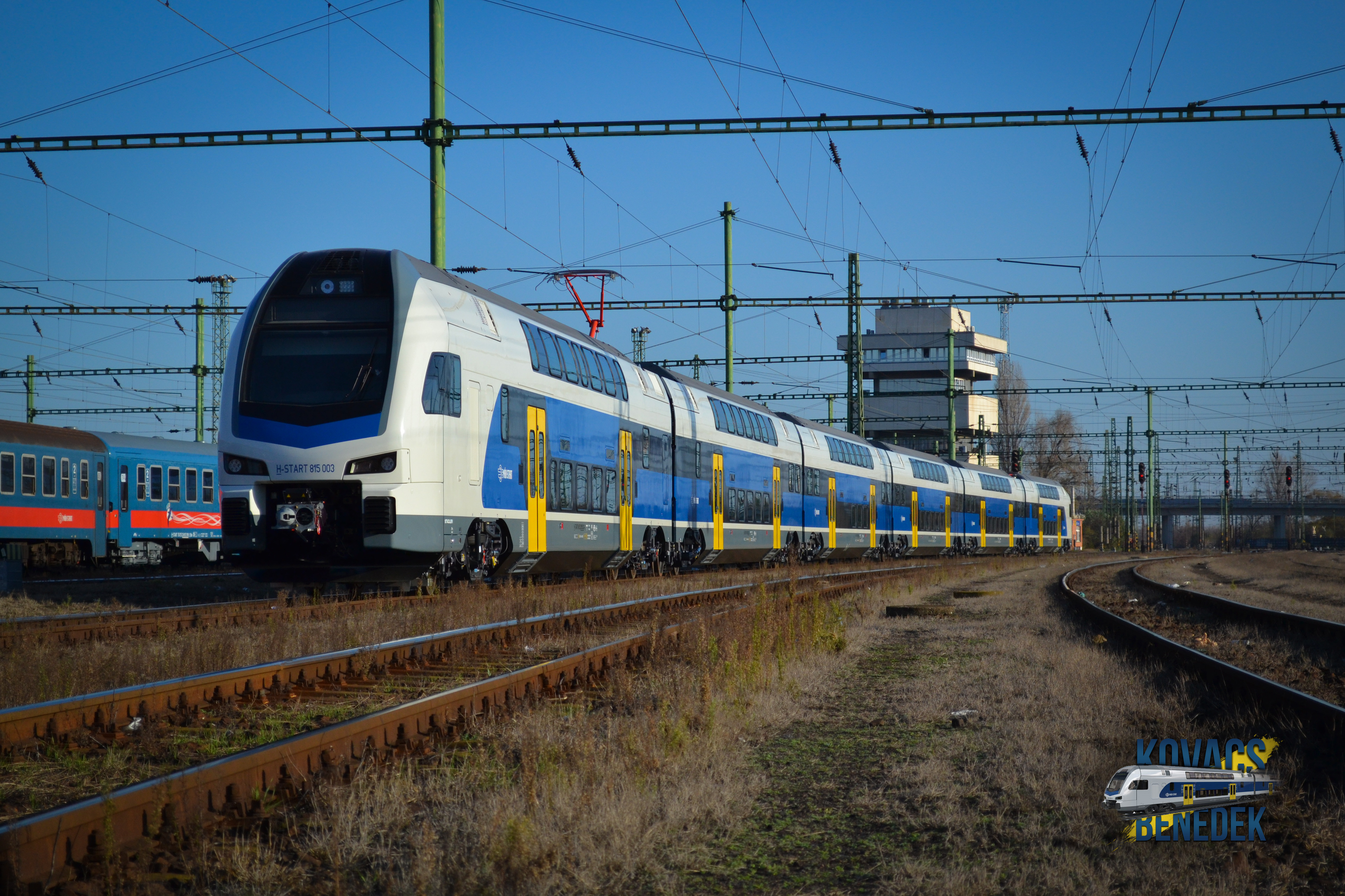 815 003 pszú. Stadler KISS motorvonat Szolnok vasútállomás egyik hátsó vágányán, futópróba előtt